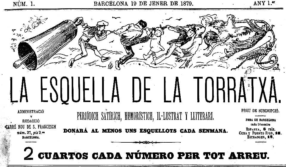 La Esquella de la Torratxa Año 1 Numero 1 Barcelona 19 Jenero de 1879